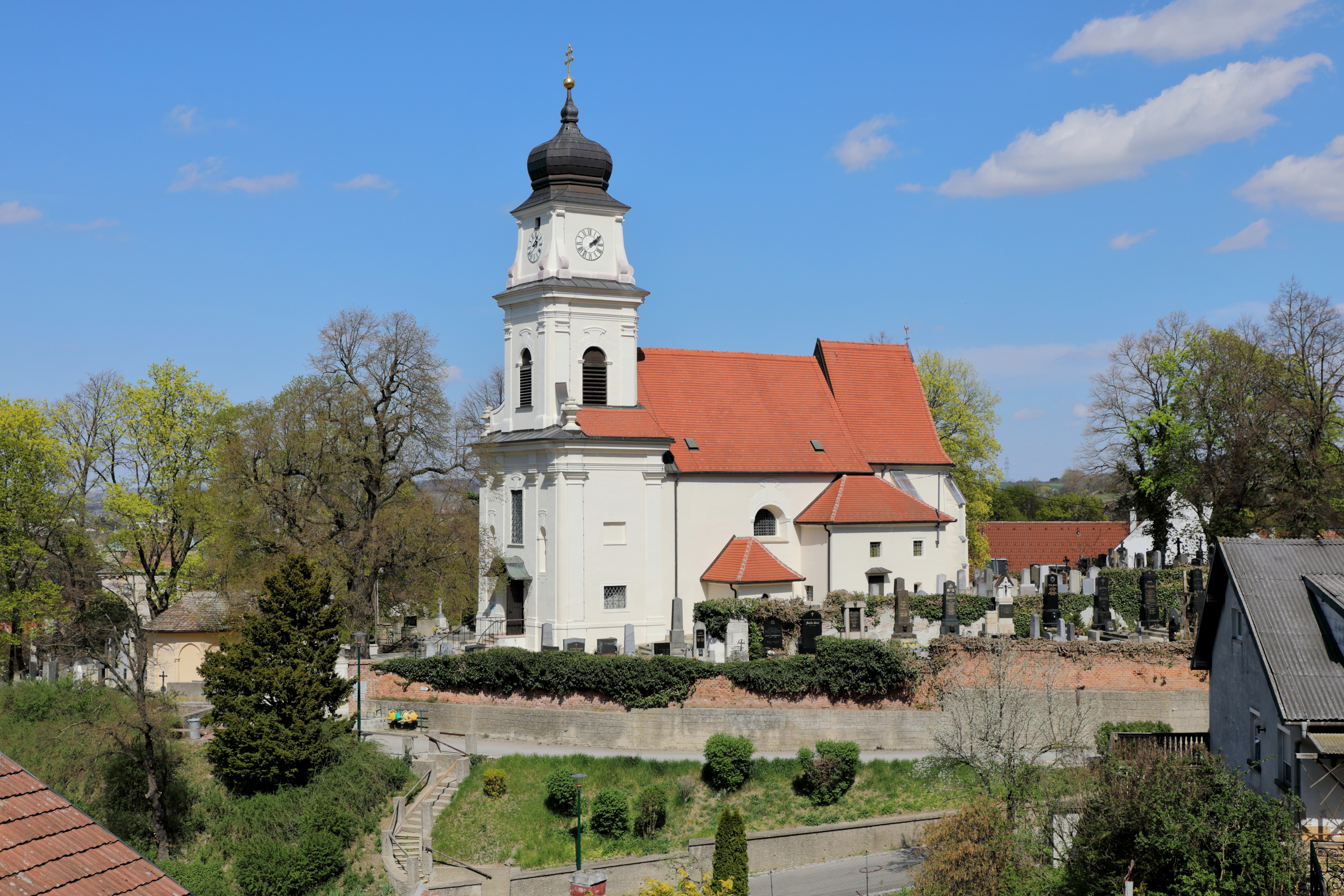 Südwestansicht der röm.-kath. Pfarrkirche hl. Johannes der Täufer in der niederösterreichischen Marktgemeinde Bisamberg.Die Kirche steht erhöht über dem Ort am nordwestlichen Abhang des Bisamberges und ist von einem Friedhof umgeben. Sie ist eine im Kern romanische, barockisierte Saalkirche mit spätgotischem Chor und spätbarockem Westturm. Der tiefe Fassadenvorbau mit Turm wurde von 1720 bis 1735 errichtet.